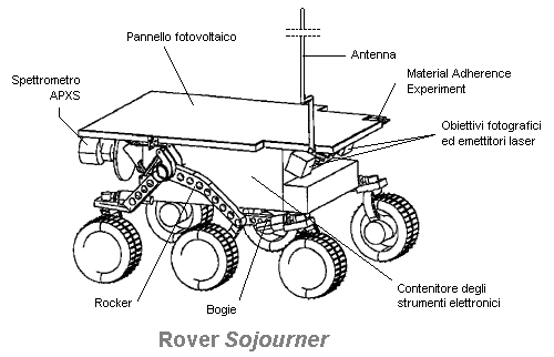 Modificada a partir de